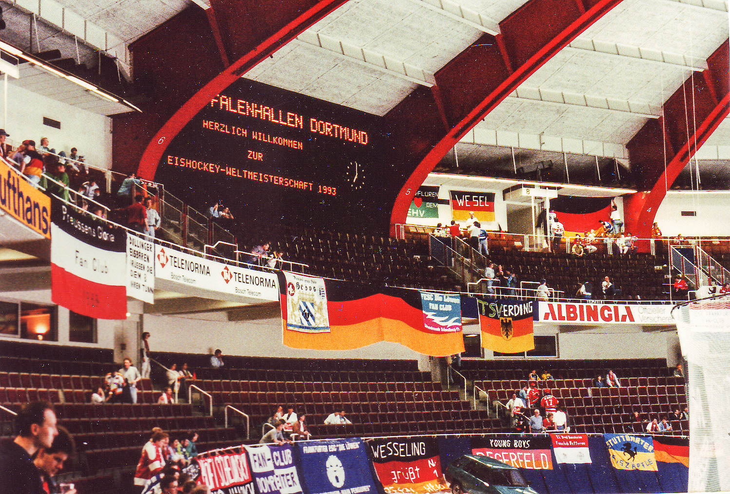 Begrüßung in der Westfalenhalle vor dem Spiel Deutschland - Finnland